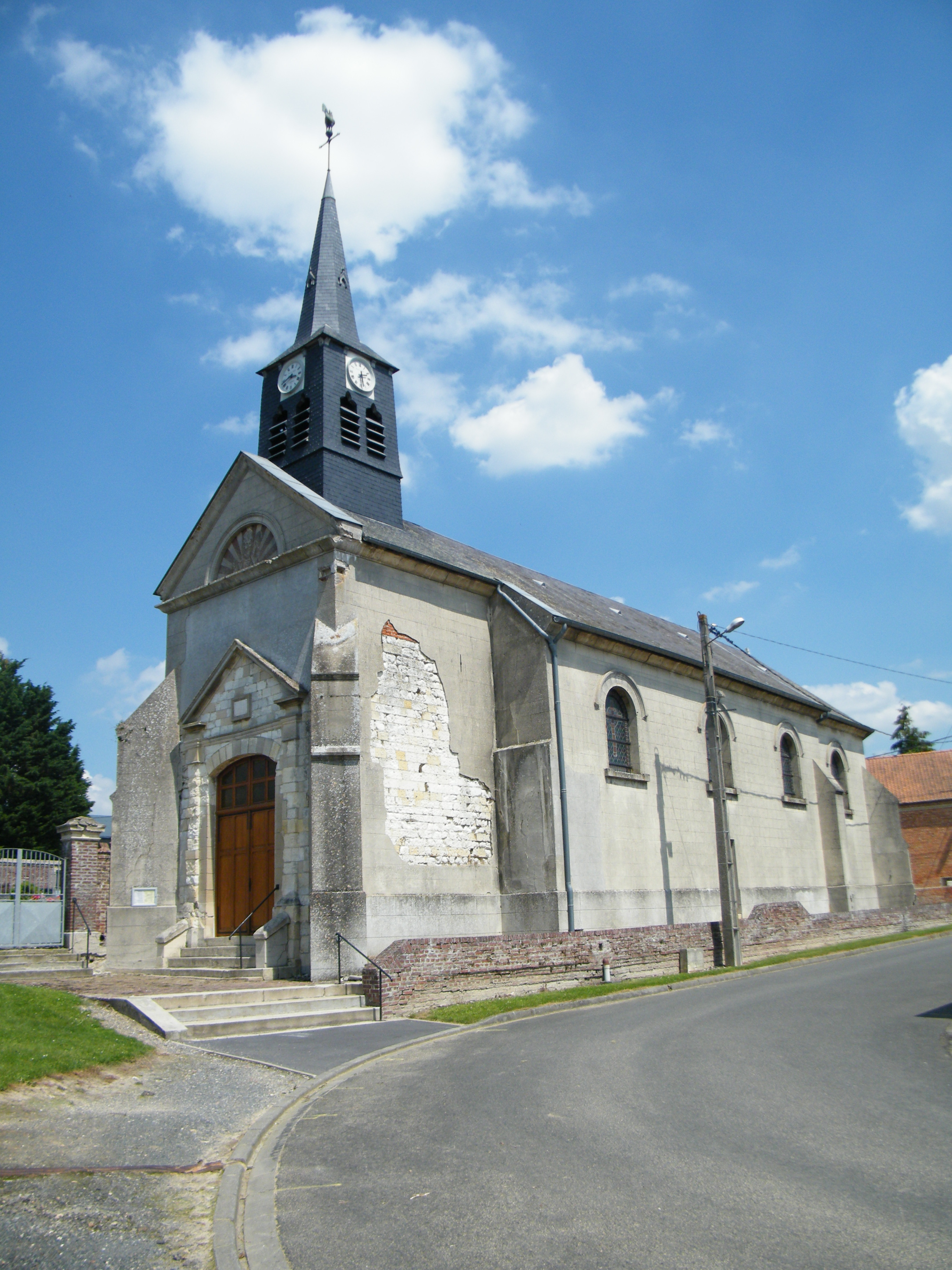 Vue de l'église.